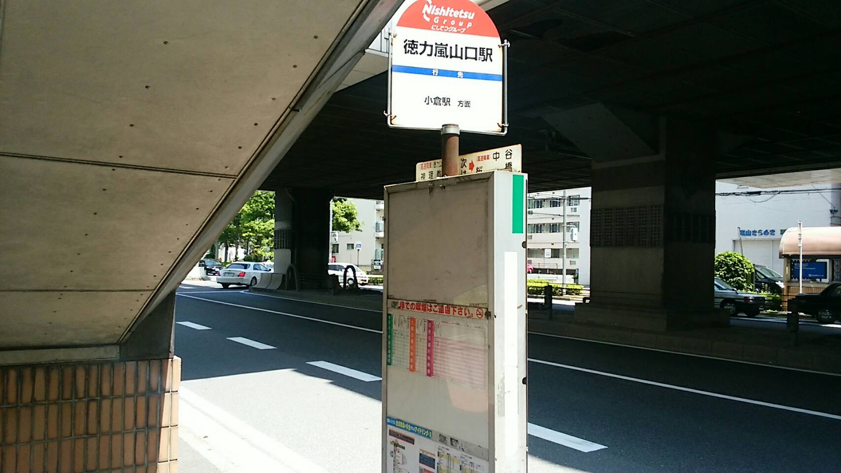 西鉄バス徳力嵐山口駅バス停（小倉方面）